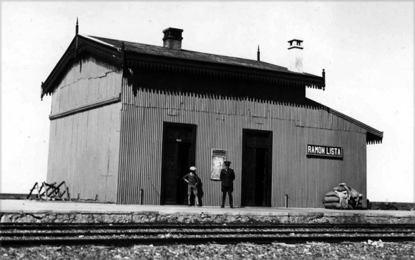 El edificio de la estación Ramón Lista en el comienzo de los años 30